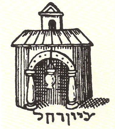 ציור של he:קבר רחל משנת 1537 מתוך הספר "יחוס האבות והנביאים"